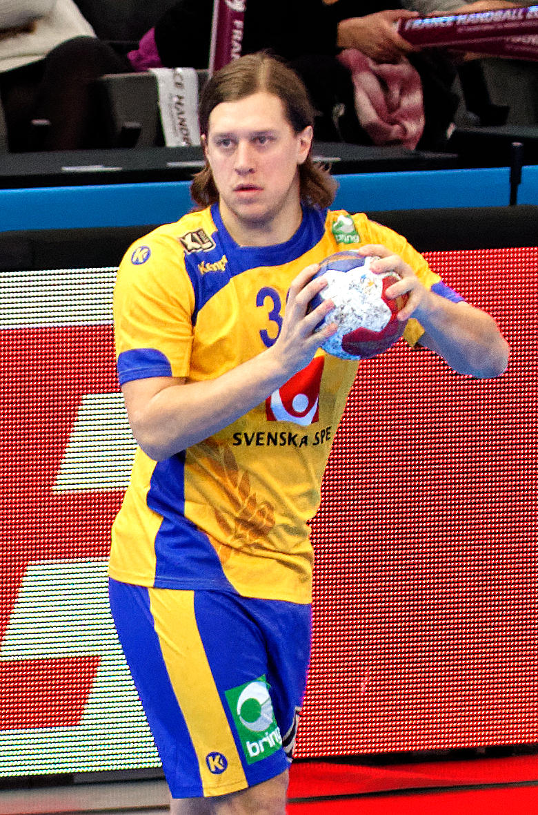 Match de la phase préliminaire du championnat du monde masculin de handball 2017 entre la Suède et le Qatar (Groupe D). A Bercy, le 18 janvier 2017.